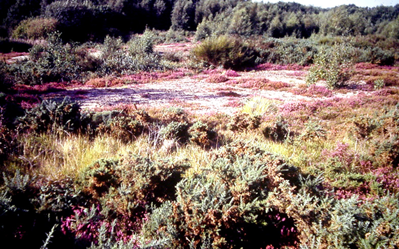 Photo ancienne (fin des années 1980) d’une vaste étendue de landes à bruyère (Bruyère centrées = Erica cinerea principalement sur cette partie relativement sèche). On distingue au loin les boisements spontanés de bouleaux et chênes ou plantations de résineux qui commencent à envahir l'ancienne lande et les anciennes «garennes» sableuses. Lieu : Partie Ouest du Plateau d’Helfaut, en limite de l’actuelle Réserve naturelle des Landes d'Helfaut (l'une des anciennes « réserves naturelles volontaires » , devenues depuis « réserves naturelles régionales ») de la Région Nord/Pas-de-Calais et l'une des quatre de ces réserves mises en place en guide de mesure compensatoires à la fragmentation supplémentaire du plateau d'Helfaut pas la VNVA (Voie nouvelle de la vallée de l'Aa) plus souvent nommée « Contournement d'Heuringhem ». C'est le début de la succession écologique vers la forêt.